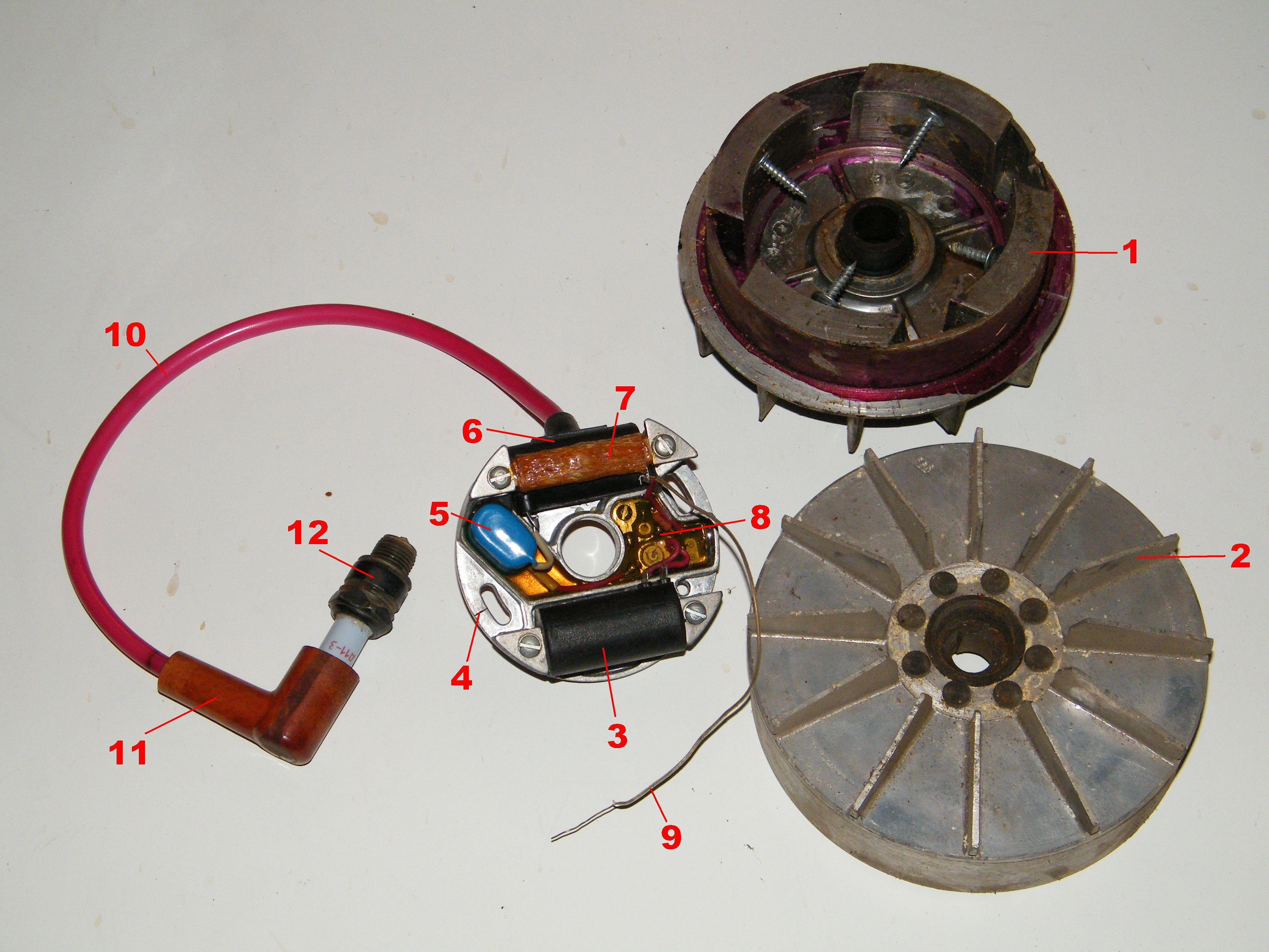 Магнето МБ-1 с маховиками 1 — маховик бензопилы «Урал» (видны две пары постоянных магнитов) 2 — маховик бензопилы «Дружба» (видны лопасти центробежного вентилятора) 3 — генераторная катушка 4 — метка для установки угла опережения зажигания 5 — конденсатор 6 — высоковольтная катушка 7 — управляющая катушка 8 — электронная схема (залита эпоксидной смолой) 9 — если этот провод кнопкой замкнуть на «массу» — остановится двигатель 10 — высоковольтный провод 11 — свечной наконечник 12 — свеча зажигания